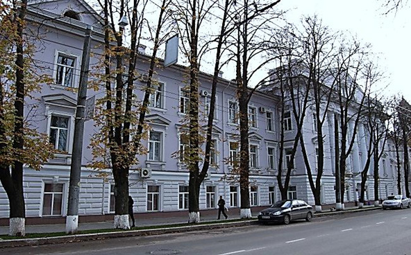 Здание окружного суда города Сумы